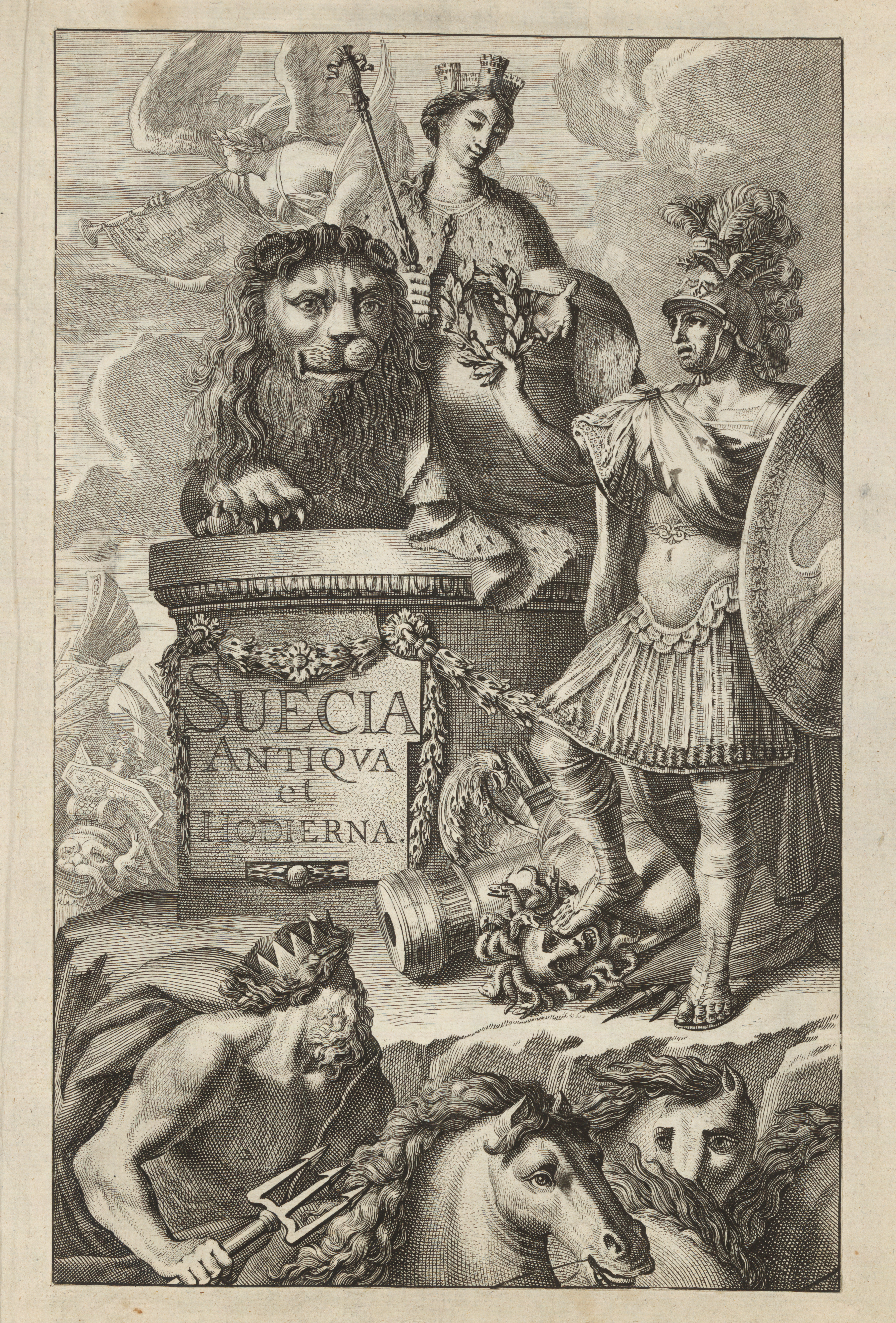 Suecia Antiqua et Hodierna - Title Page